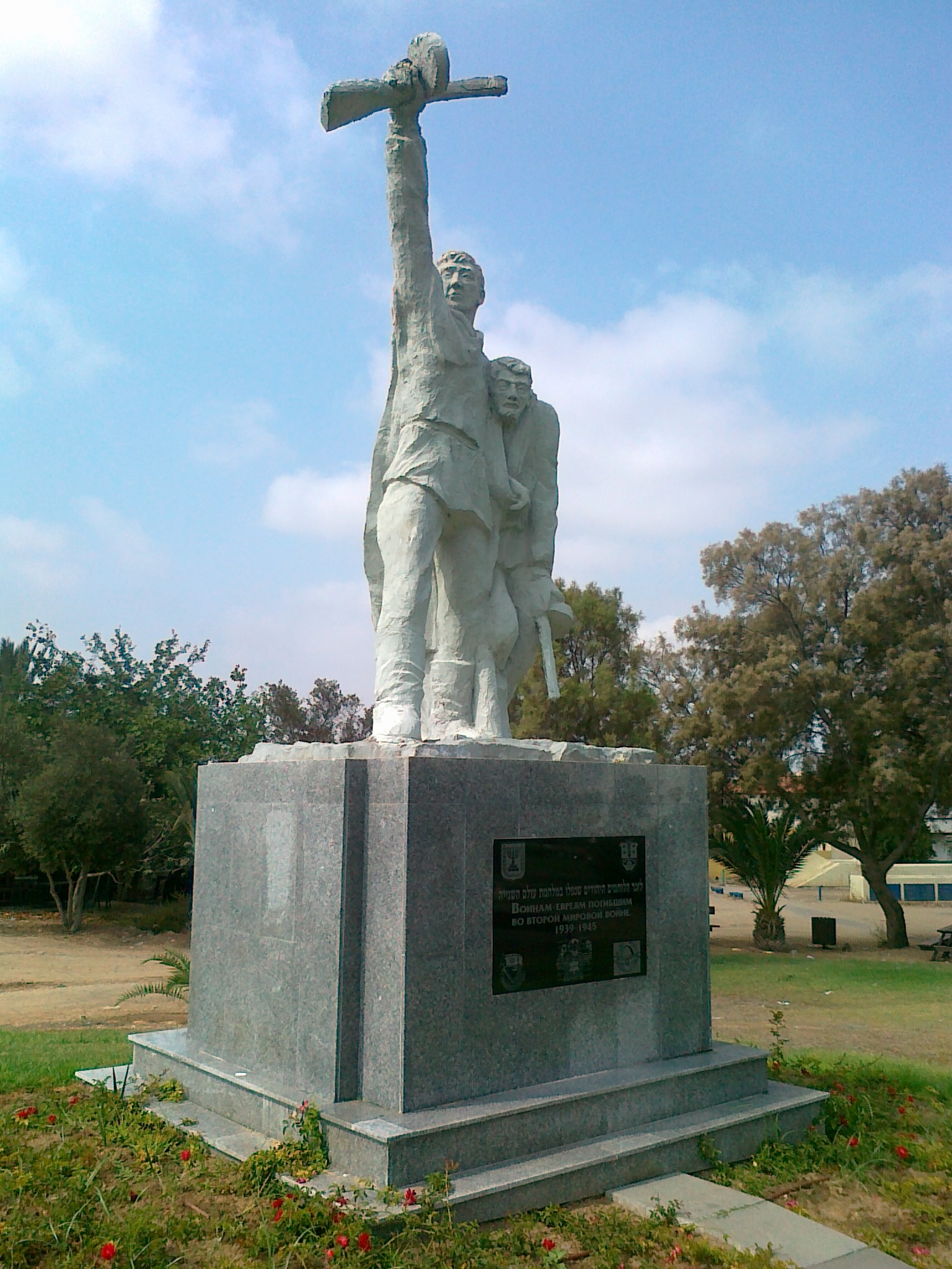 צילום של אנדרטה לזכר החיילים היהודים שנהרגו במלחמת העולם ה-2 באשקלון